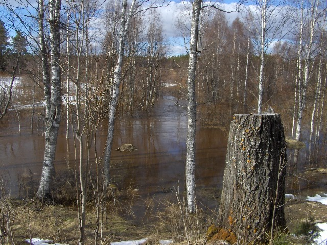 Pohjajoki (Kainuun) tulvii 29.4.2019